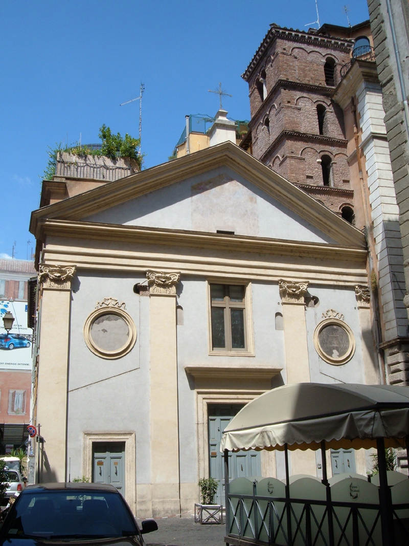 Chiesa di San Salvatore alle Coppelle, nel rione Sant'Eustachio, a Roma